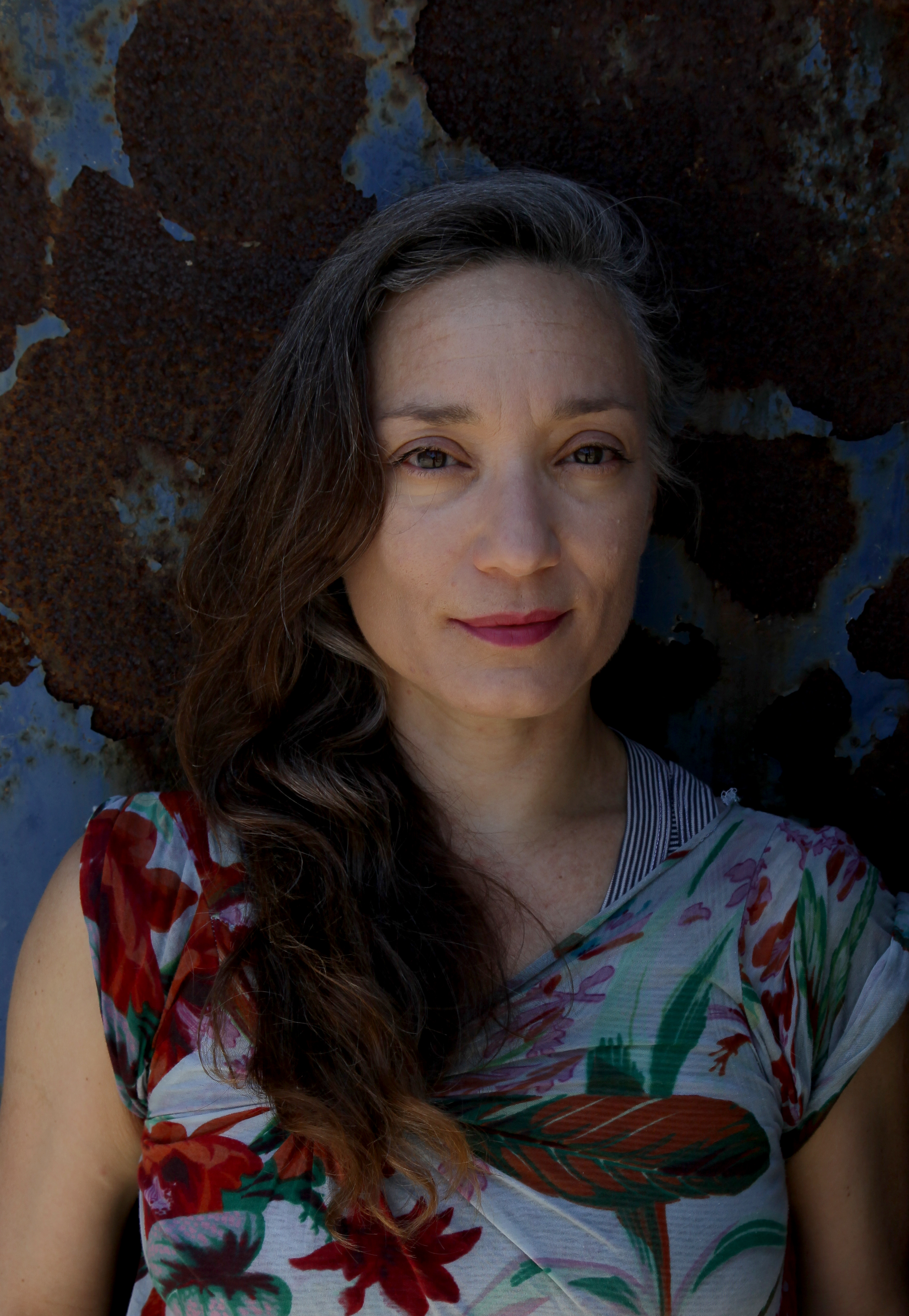 Noa Dar - Choreographer, Photo: Tamar Lamm